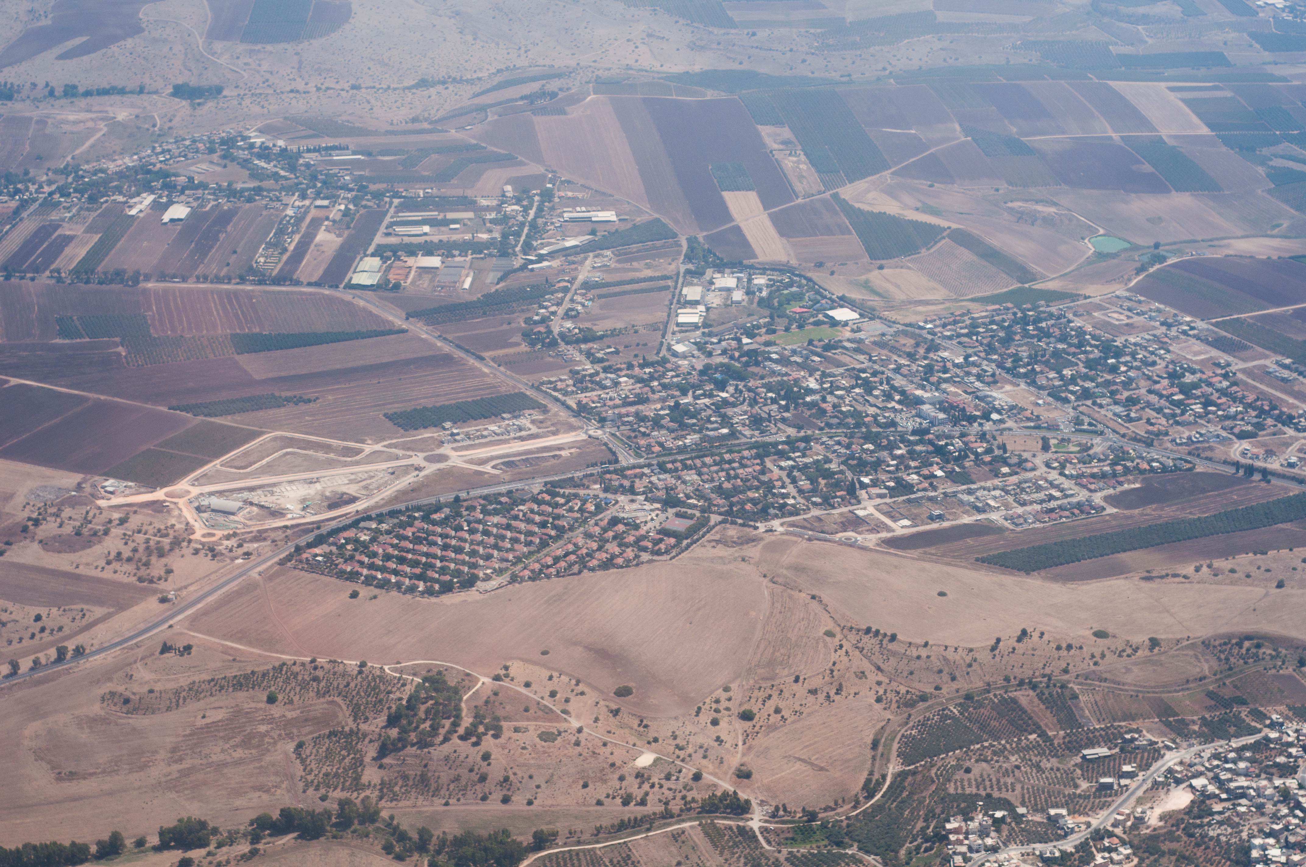 כפר תבור